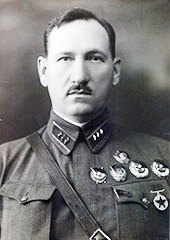 Михаил Григорьевич Ефремов (1897 — 1942) — советский военачальник